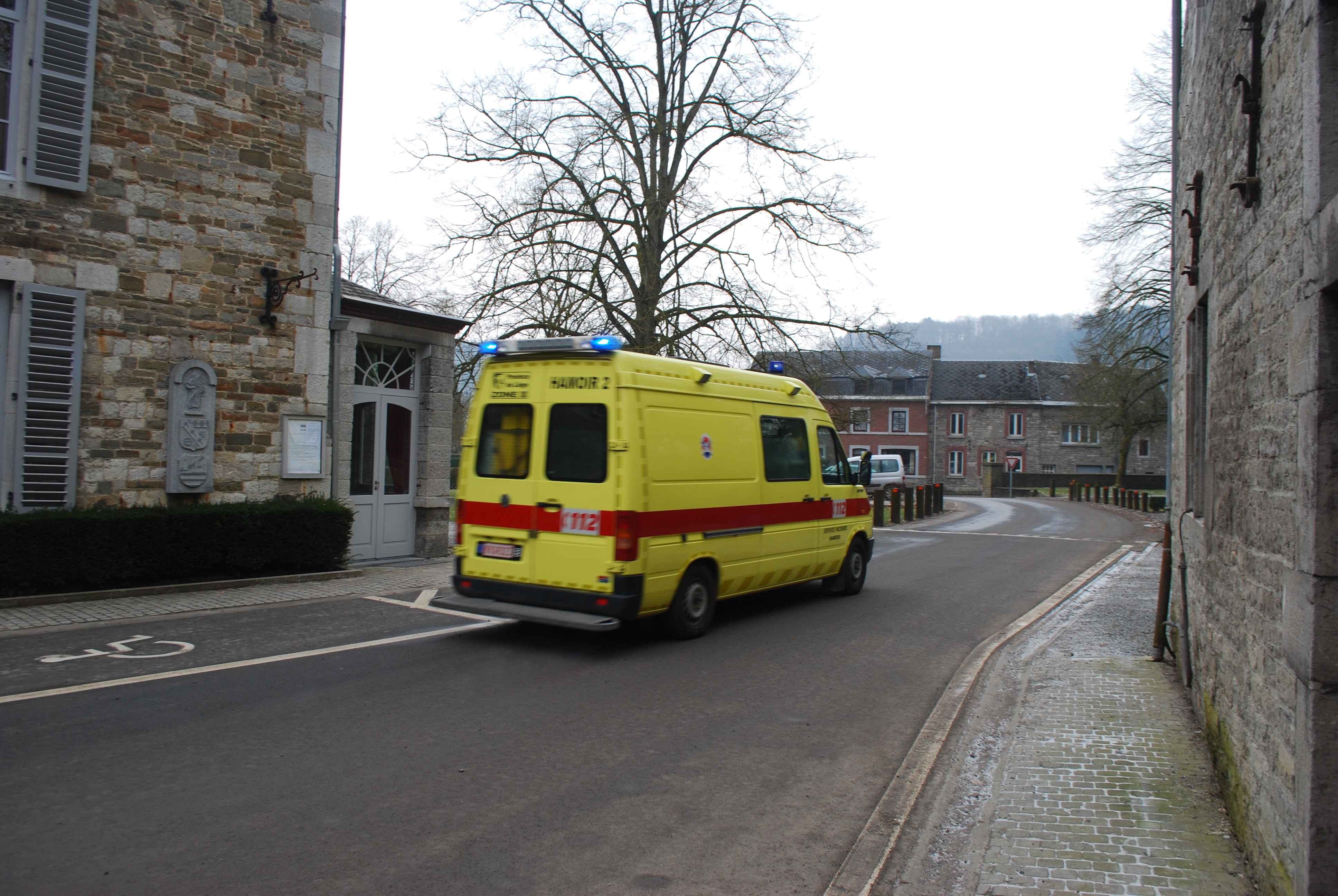 Vue du château du Vieux Fourneau, siège de l'administration communale de Hamoir.